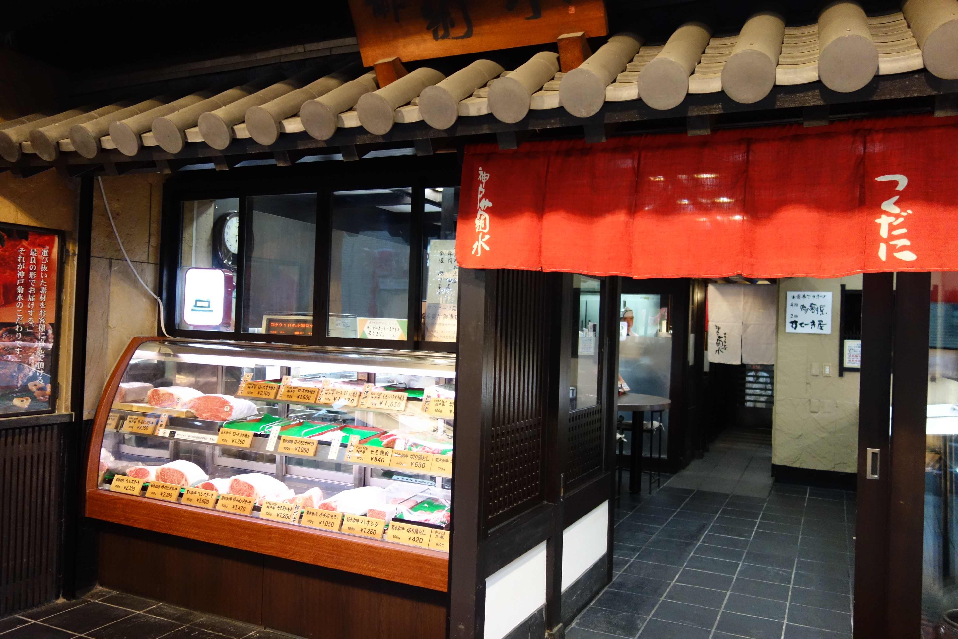 神戶三宮